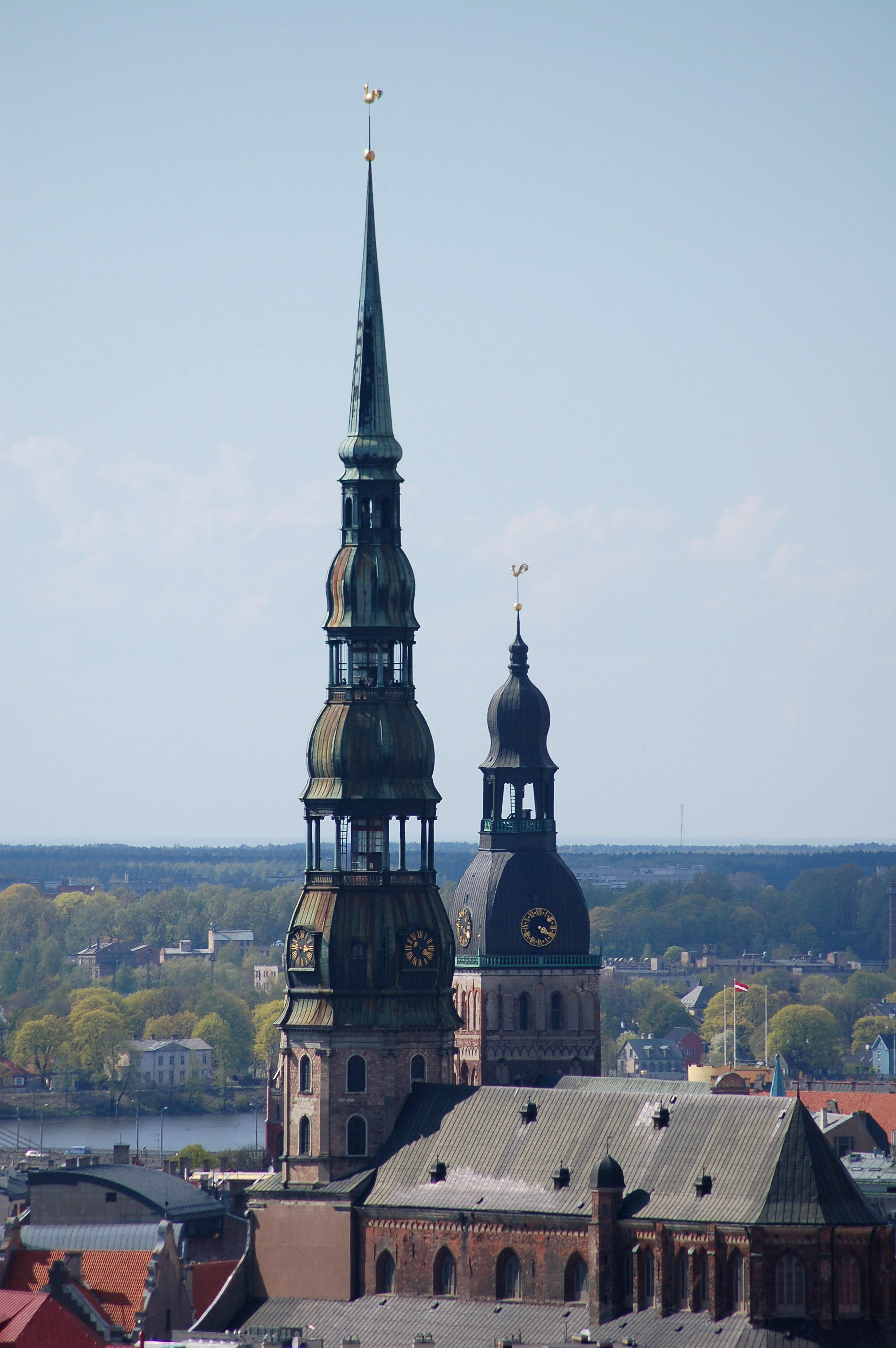 St. Peter's Church, Riga. Petrikirche_(Riga)